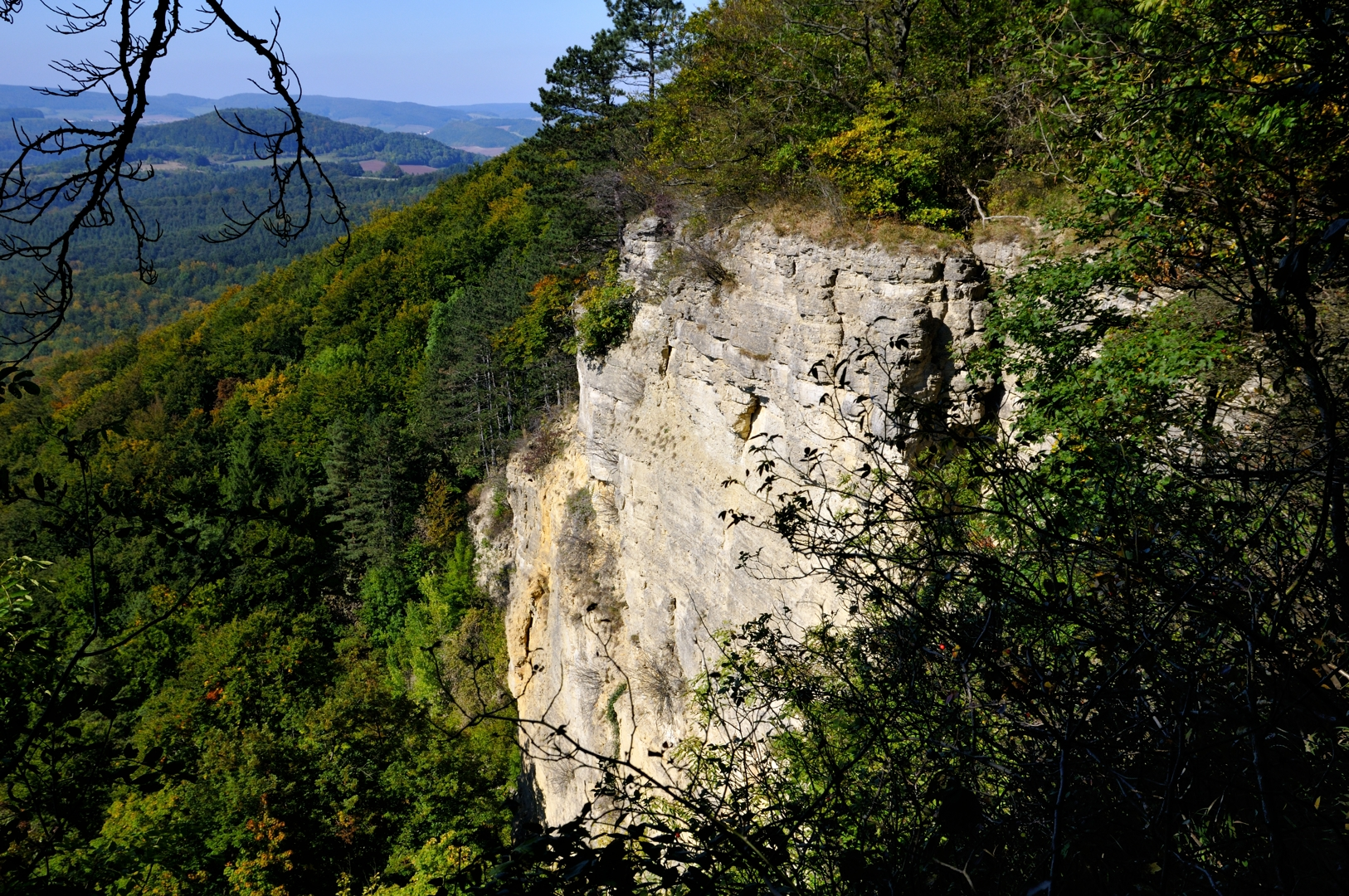 Wanfried auf der Plesse "Der Plessefelsen": Blick von Südost zum Hülfensberg (im Hintergrund die nördlichen Ausläufer der Gobert mit Hesselkopf und Rachelsberg)